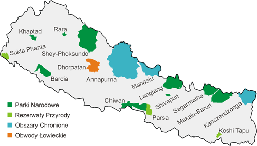 Obszary Chronione Nepalu